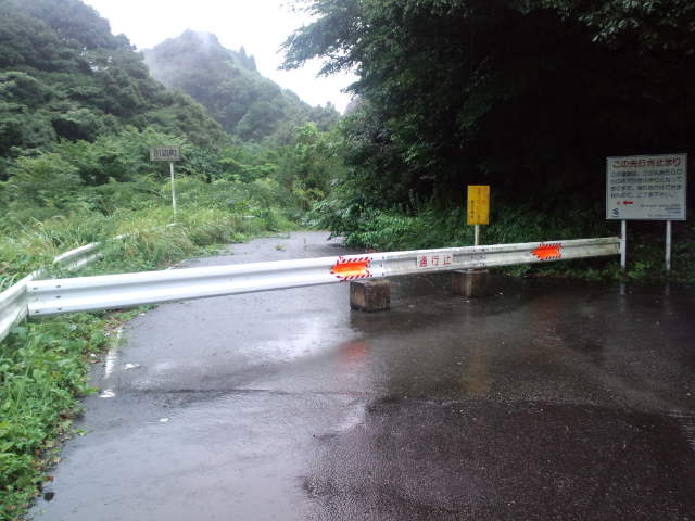 鹿児島県道19号線の旧道